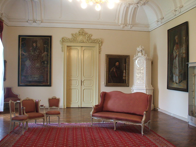 Vue d'un salon du palais épiscopal de Vrsac.